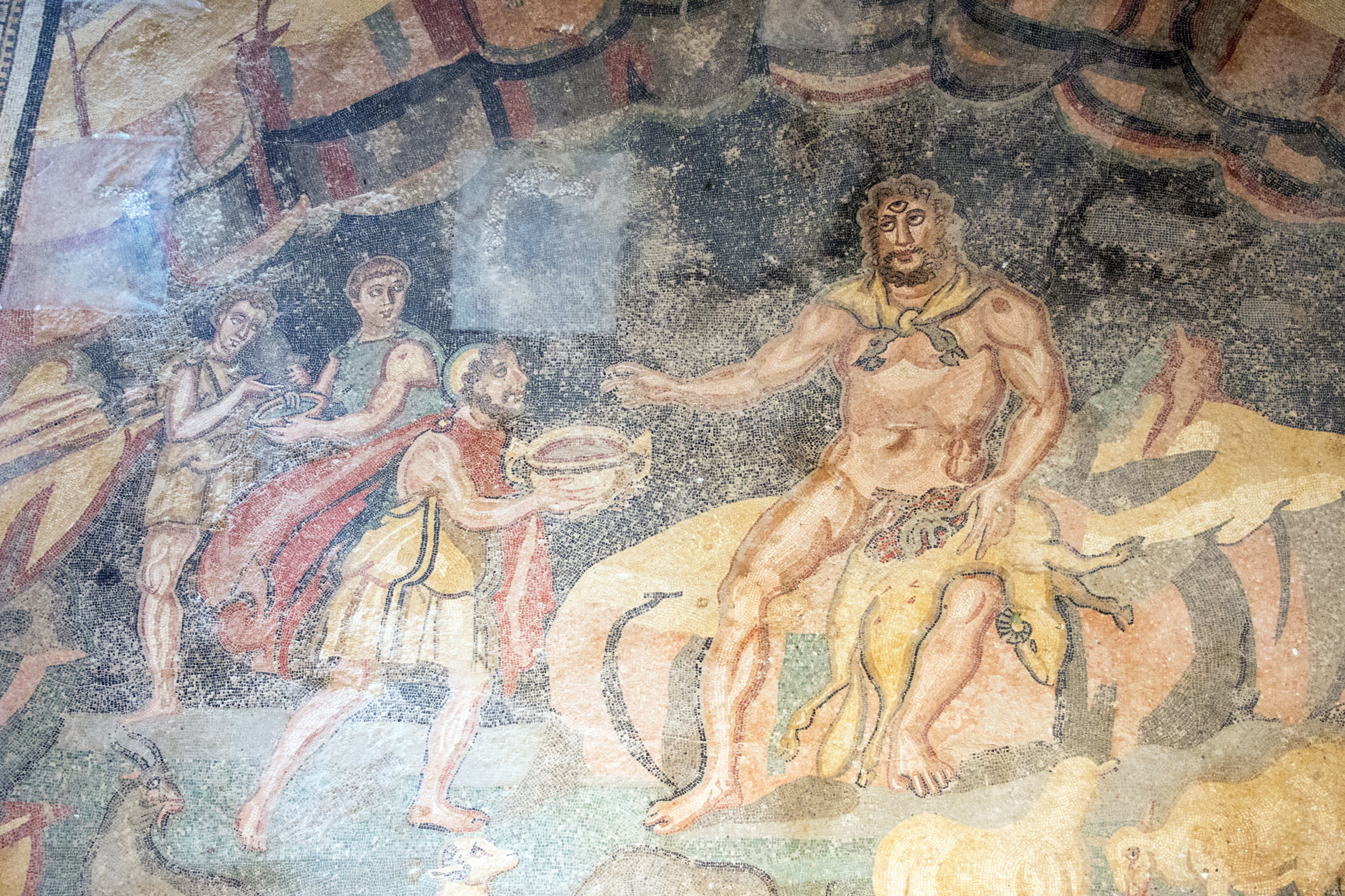 Villa Romana del Casale